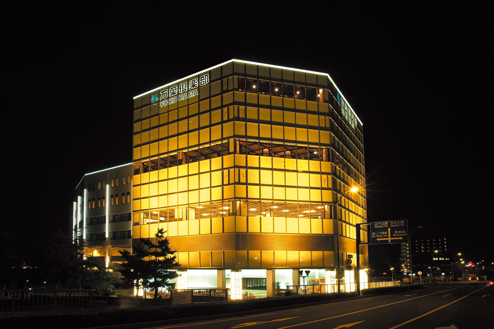 横浜みなとみらい 万葉倶楽部